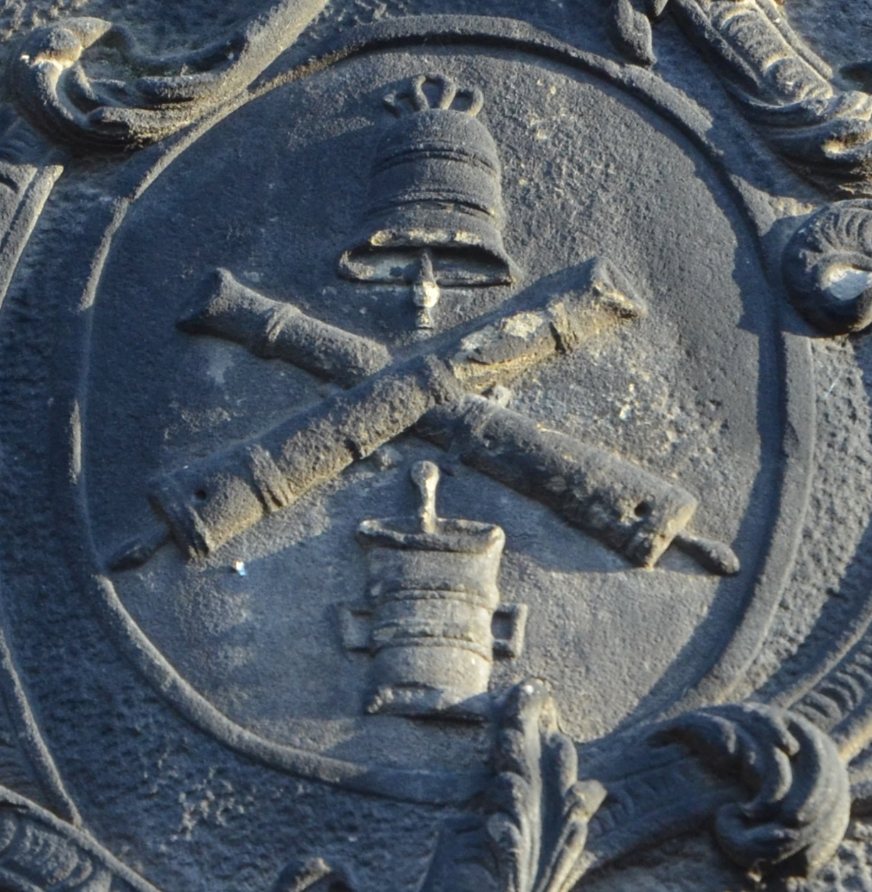 An der nördlichen Außenwand der Marktkirche in Hannover findet sich fast an der Schmiedestraße diese Grabstele für den zuvor am Steintor (Hannover)|Steintor tätigen Stück- und Glockengießer Johann Heinrich Christoph Weidemann (1717-1785) und dessen Ehefrau Ilsa Dorothea Heise (Heisen). Deutlich sind in dem bekrönten Schild zwei gekreuzte Geschützrohre für Kanonen zu sehen, darüber eine Kirchenglocke, senkrecht darunter ein gegossener Mörser zum Zerreiben mit einem Stößel ...